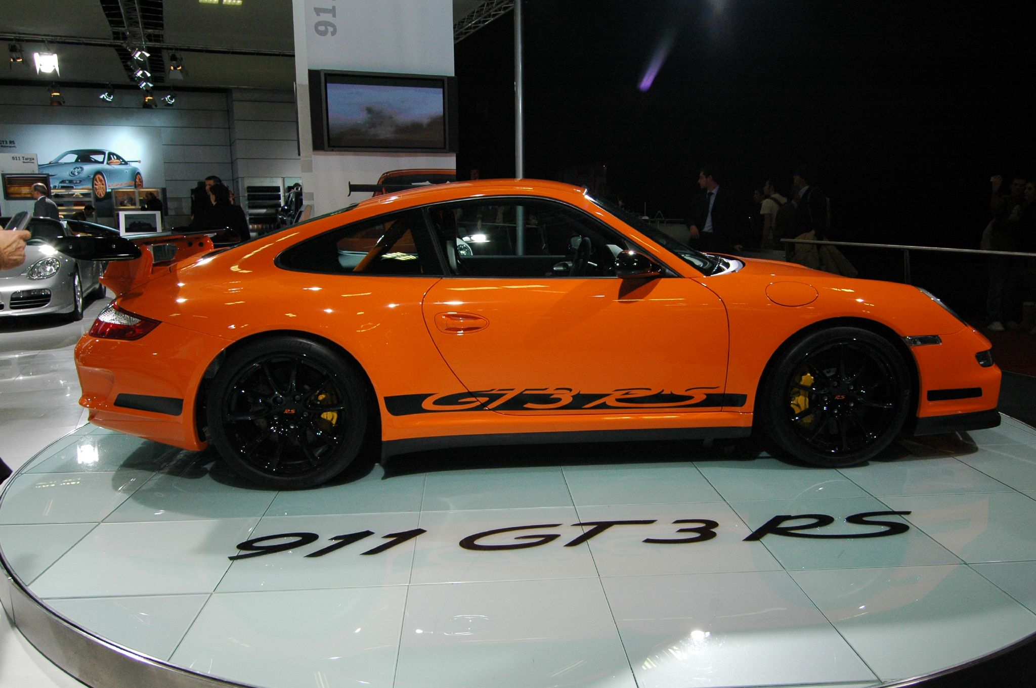 Orange Porsche 911 GT3 RS Type 997 (side)